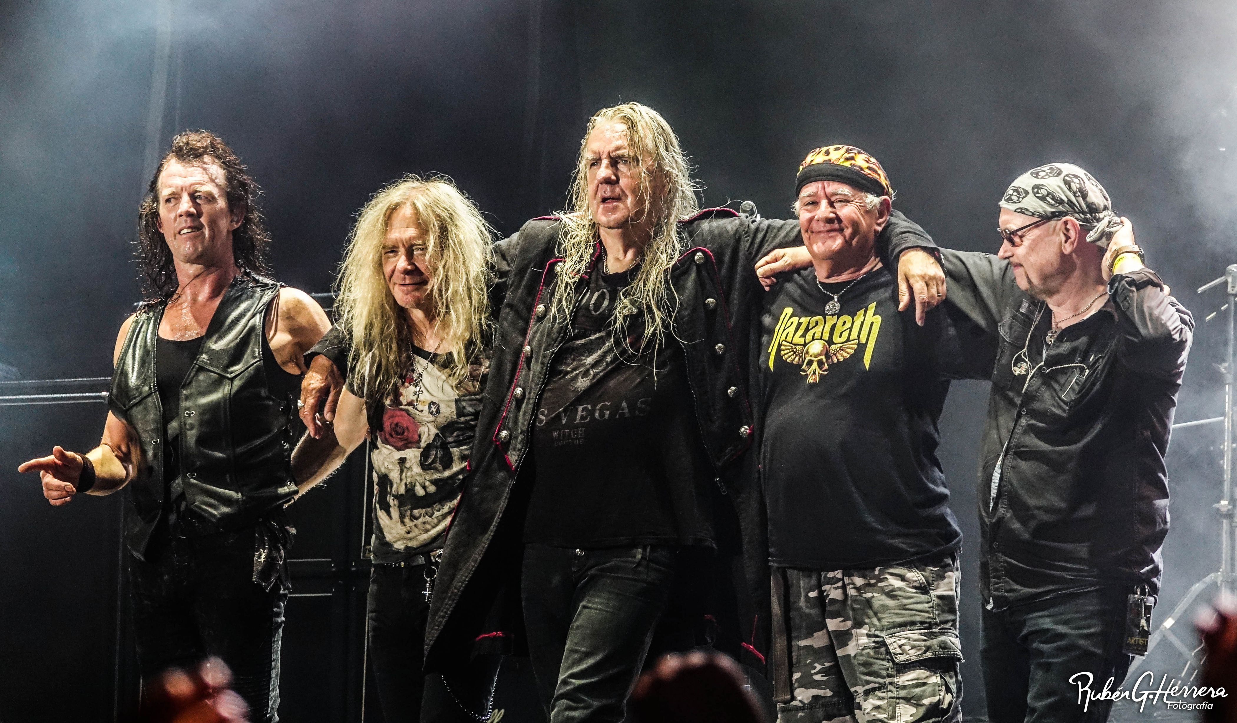 Saxon en el festival Leyendas del Rock, en 2018